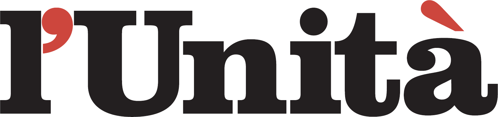 Логотип итальянской газеты «Унита»